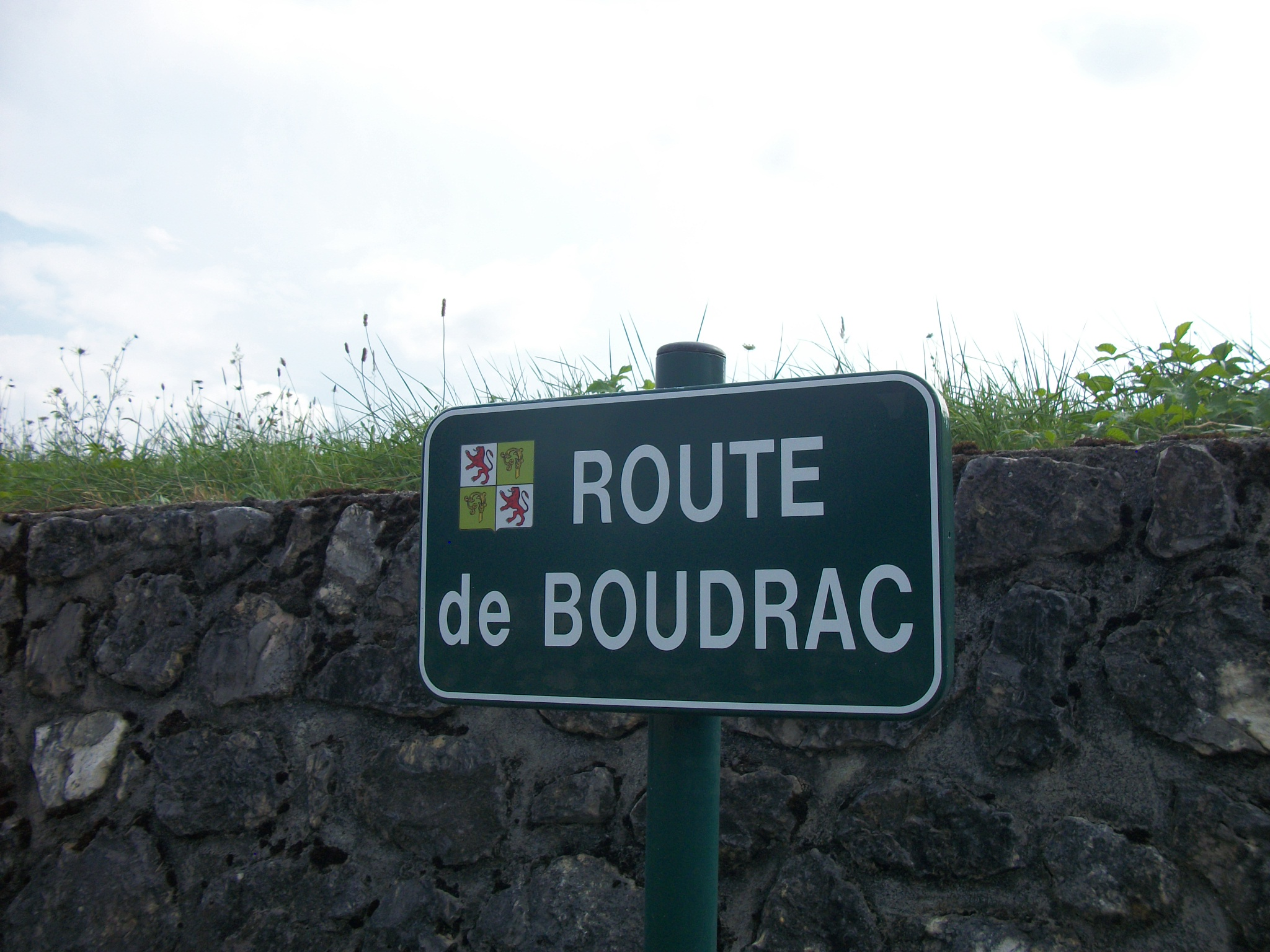 Cazaril-Tambourès